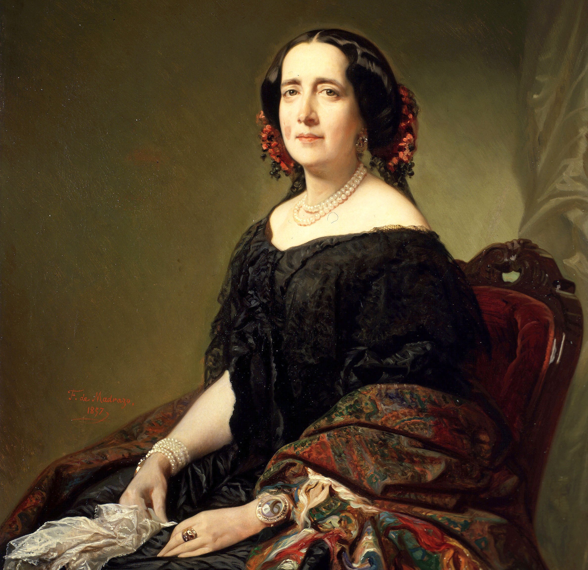 Retrato de la escritora romántica de origen cubano Gertrudis Gómez de Avellaneda (1814-1873).